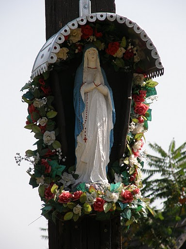 Kereszt Felsőszölnökről (Vas megye)